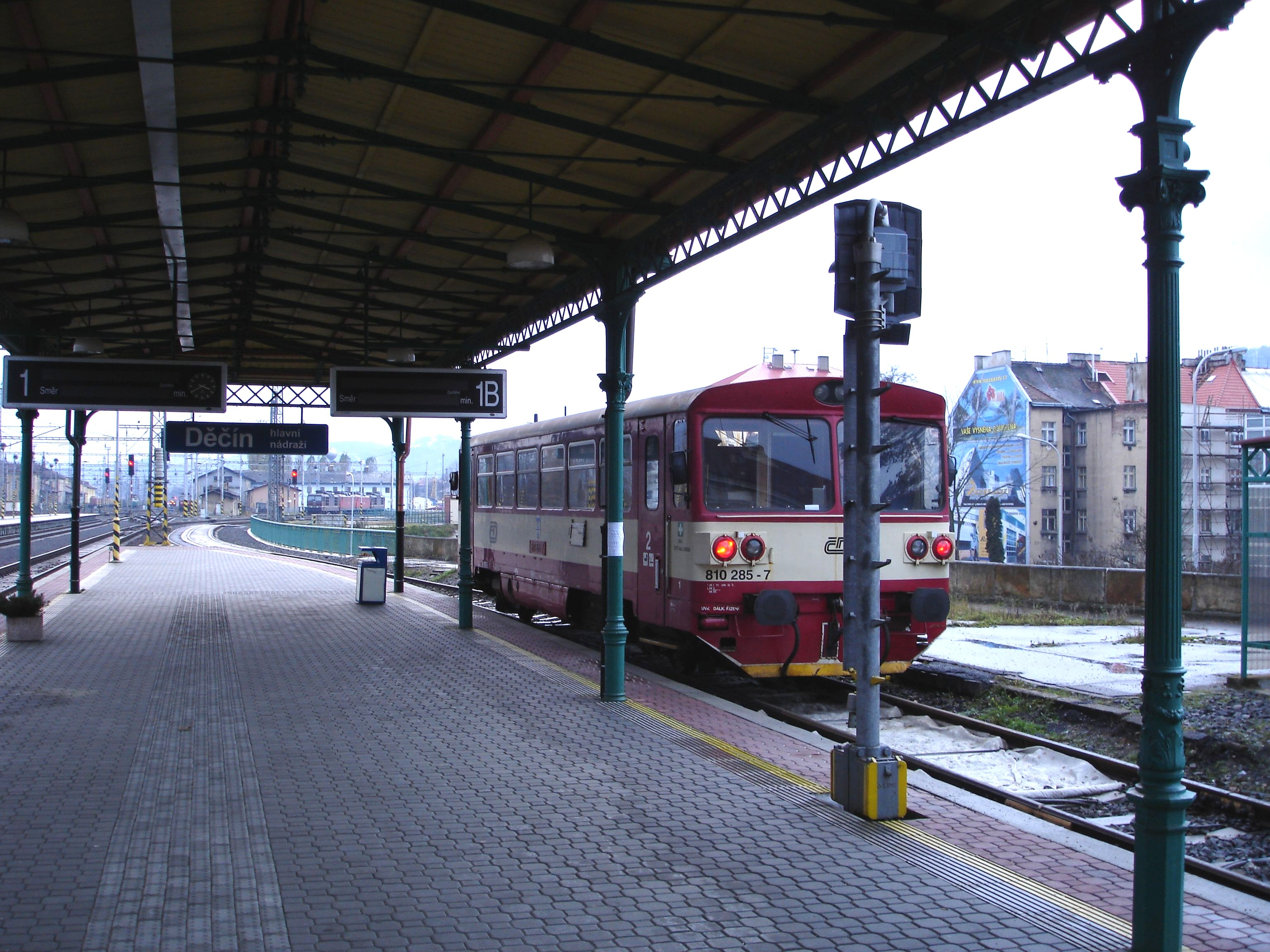 Triebwagen der CD-Baureihe 810 in Děčín hlavní nádraží